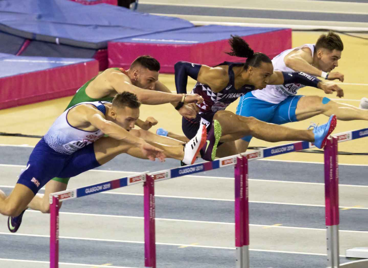 EKI30079 halve finale 60mH martinot lagarde